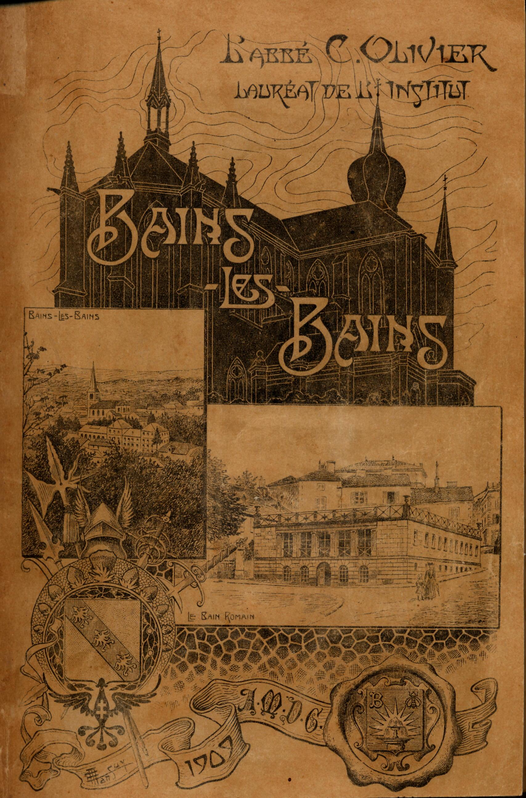 couverture originale de l'histoire de Bains-les-Bains par l'Abbé Constant Olivier 1909